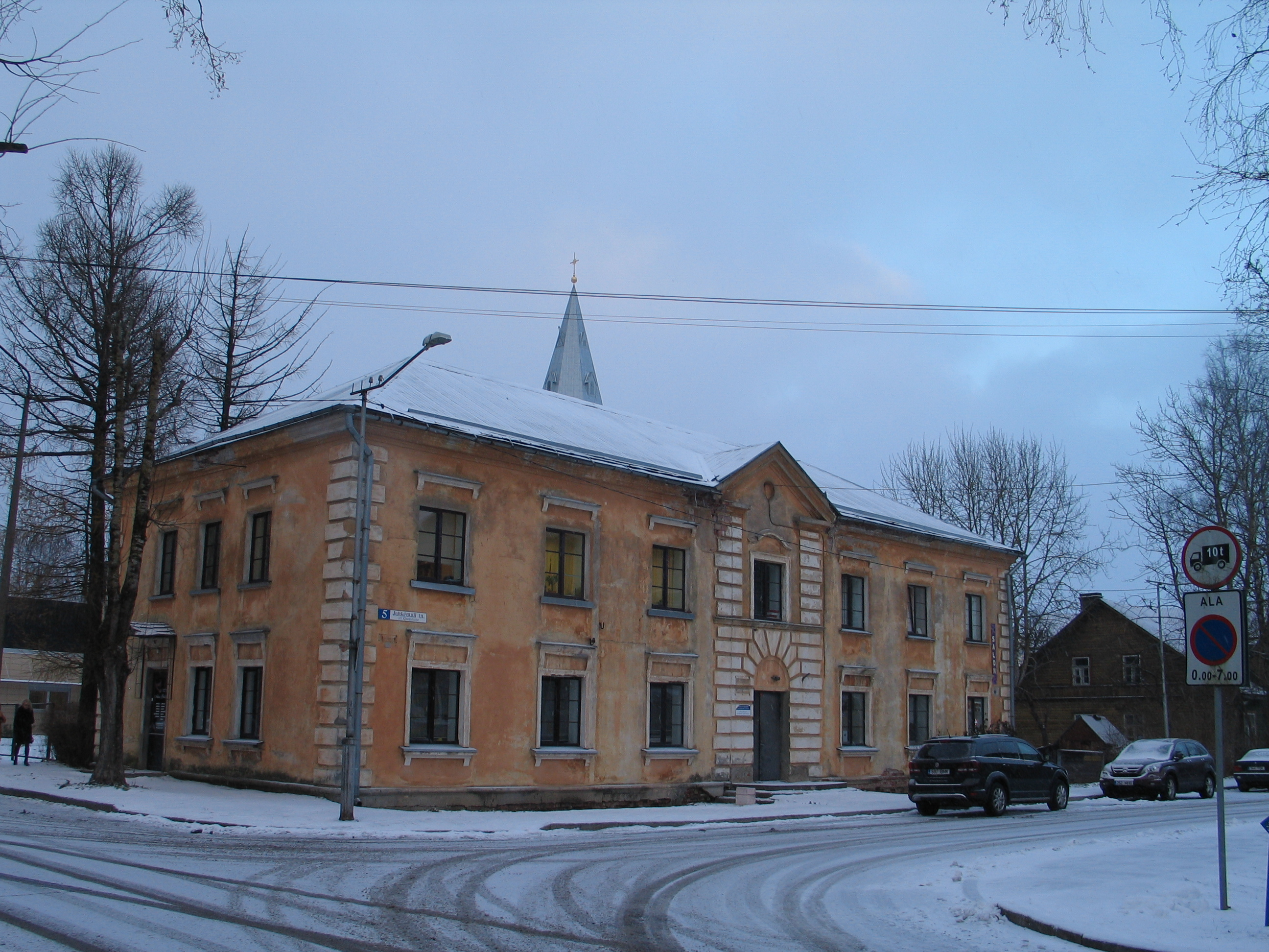 Juhkentali tn. 5